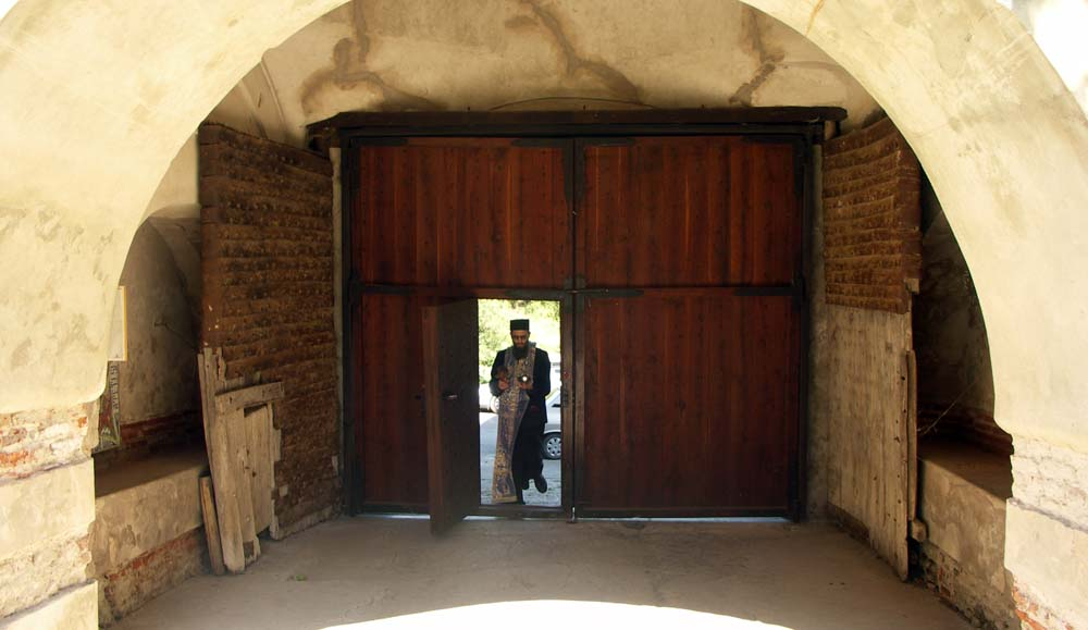 Mănăstirea Gura Motrului. Intrarea în mănăstire pe sub turnul clopotniţă. 04